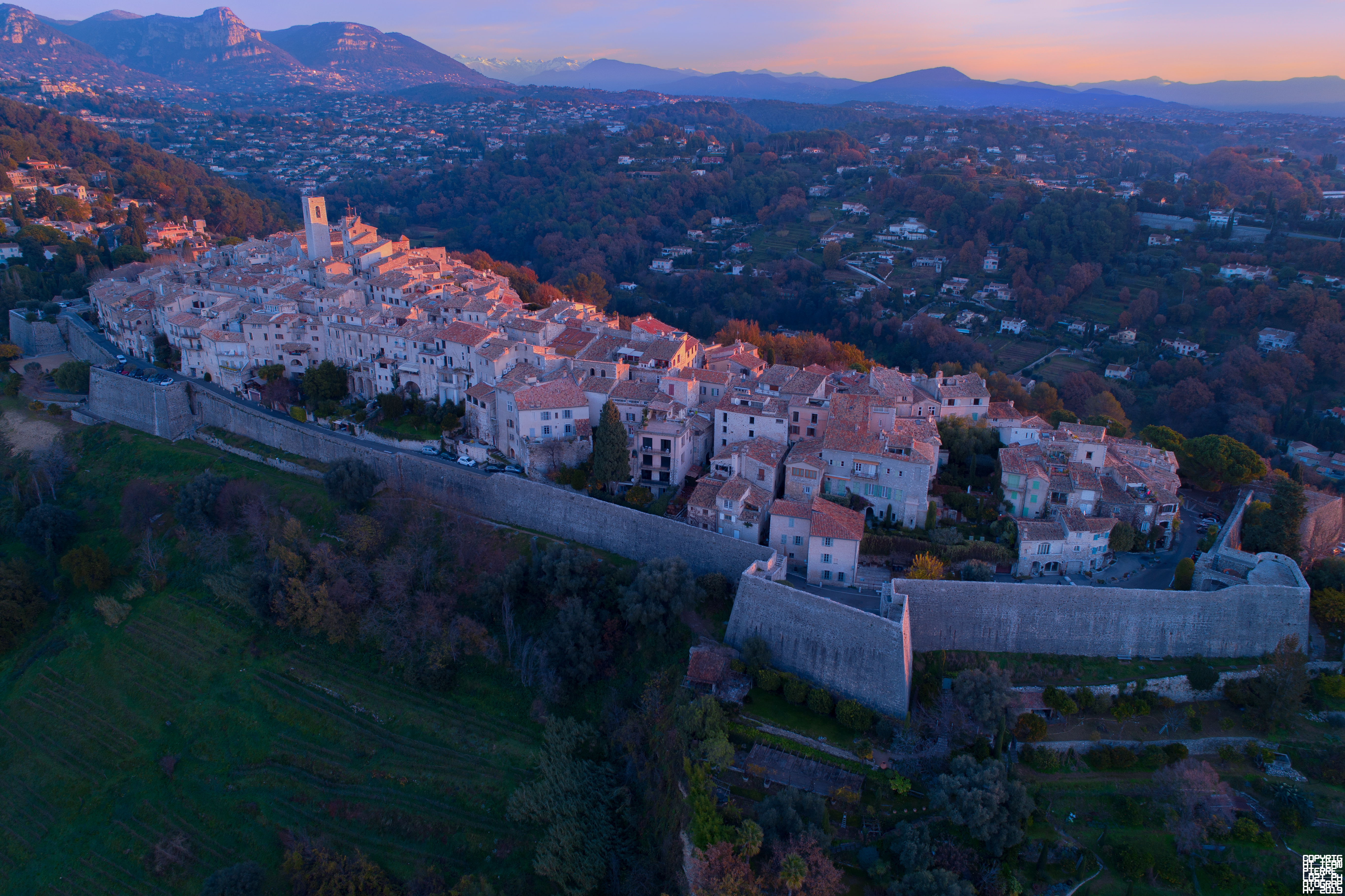 Une photographie aérienne du village de Saint-Paul-de-Vence, qui montre notamment l'intégralité de la face ouest des fortifications de Vauban. .